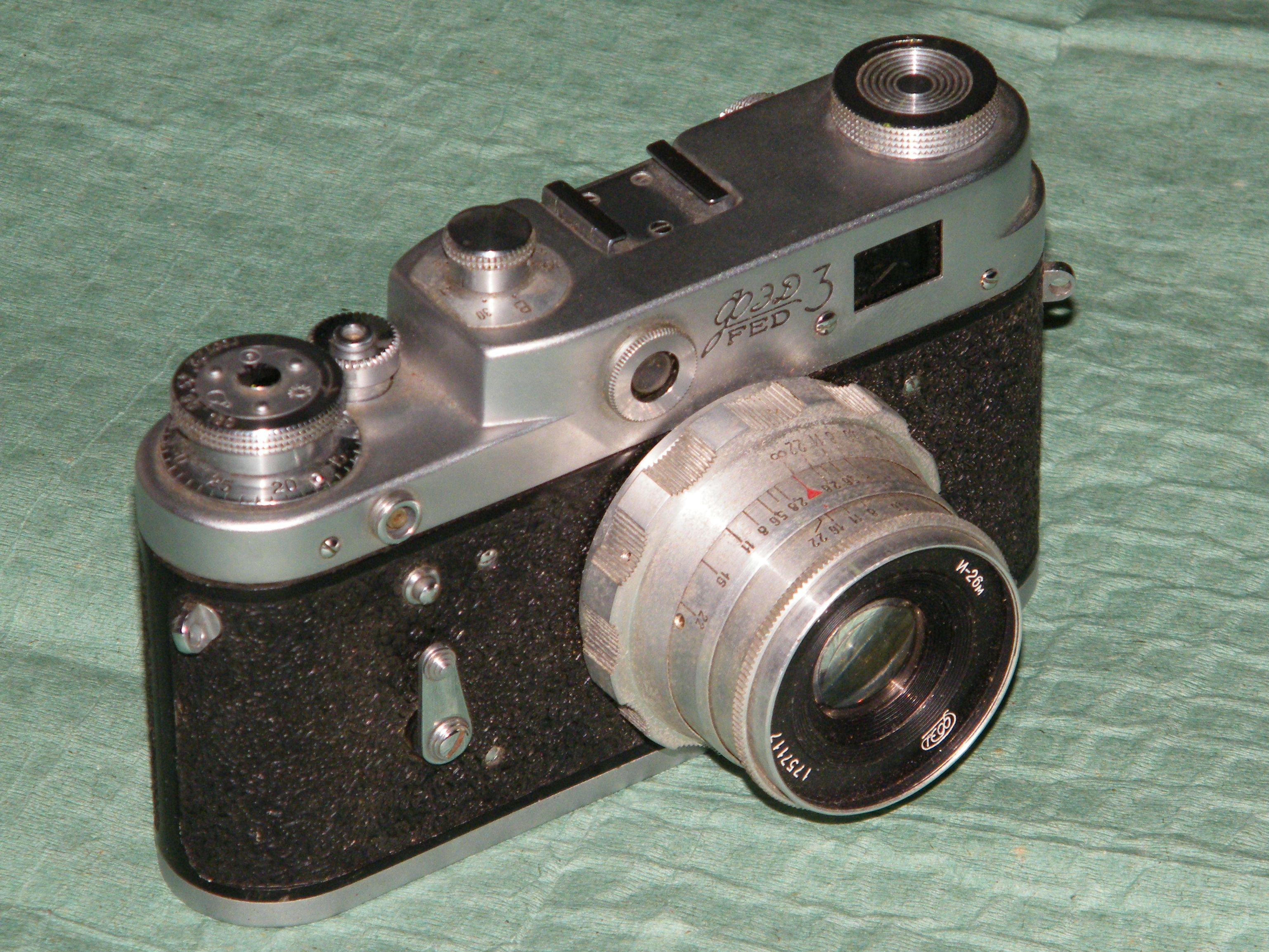 Фотоаппарат ФЭД-3 с бескурковым взводом затвора